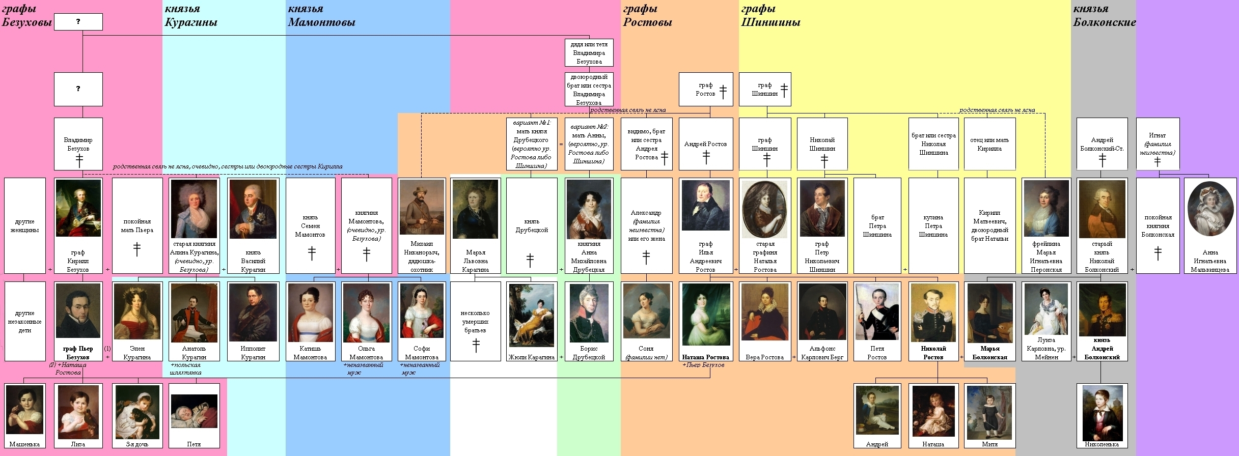 Родословное древо персонажей "Войны и мира" Льва Толстого